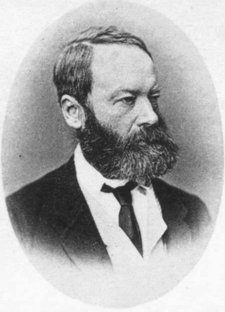 Porträtfotografie von Adolph Schoder.